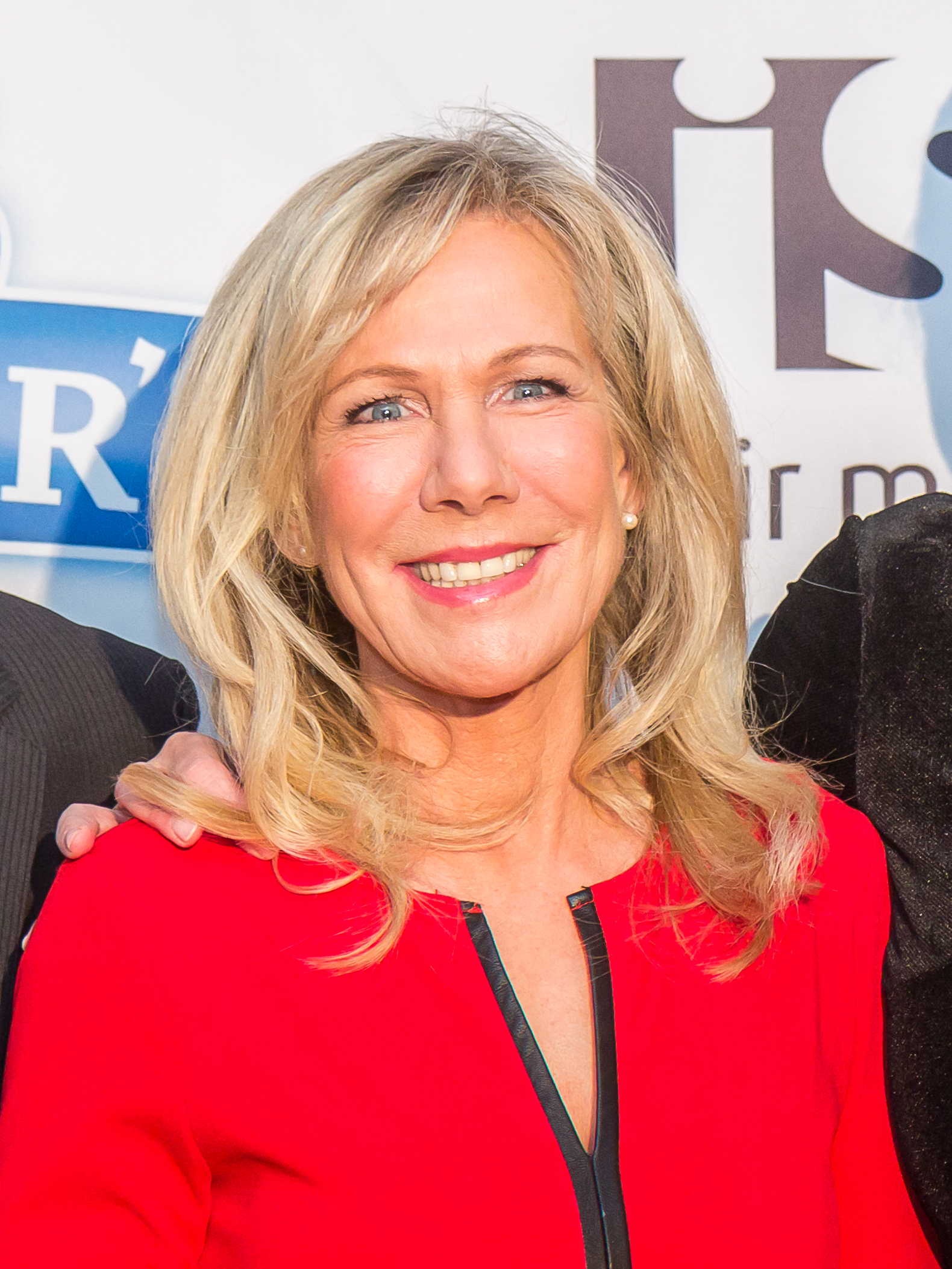 Kölner Charity Sports Night 2017. Foto: Ulrike von der Groeben